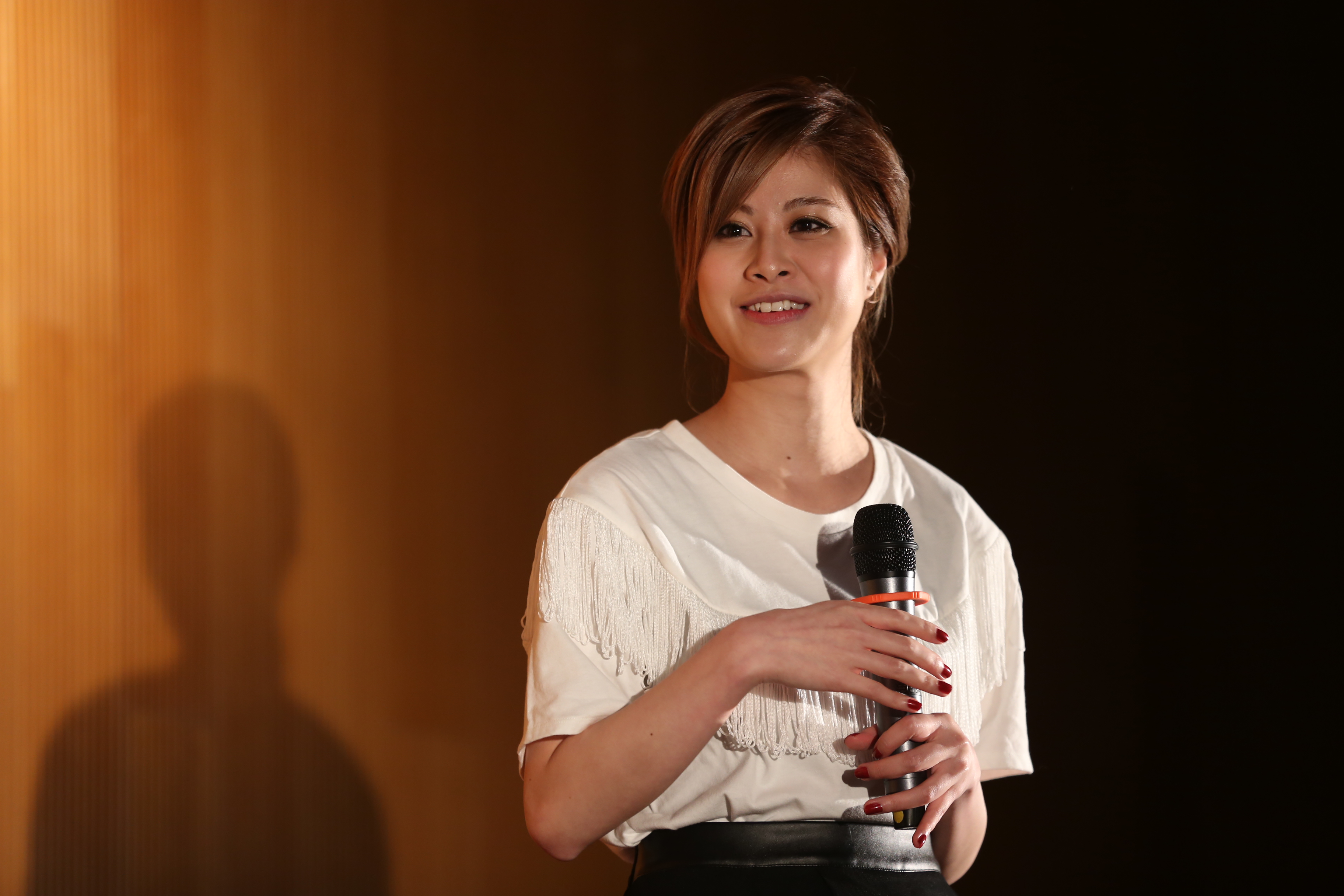 中文（香港）: Keeva 出席東華學院 聲‧夜SING CON 總決賽 任表演嘉賓